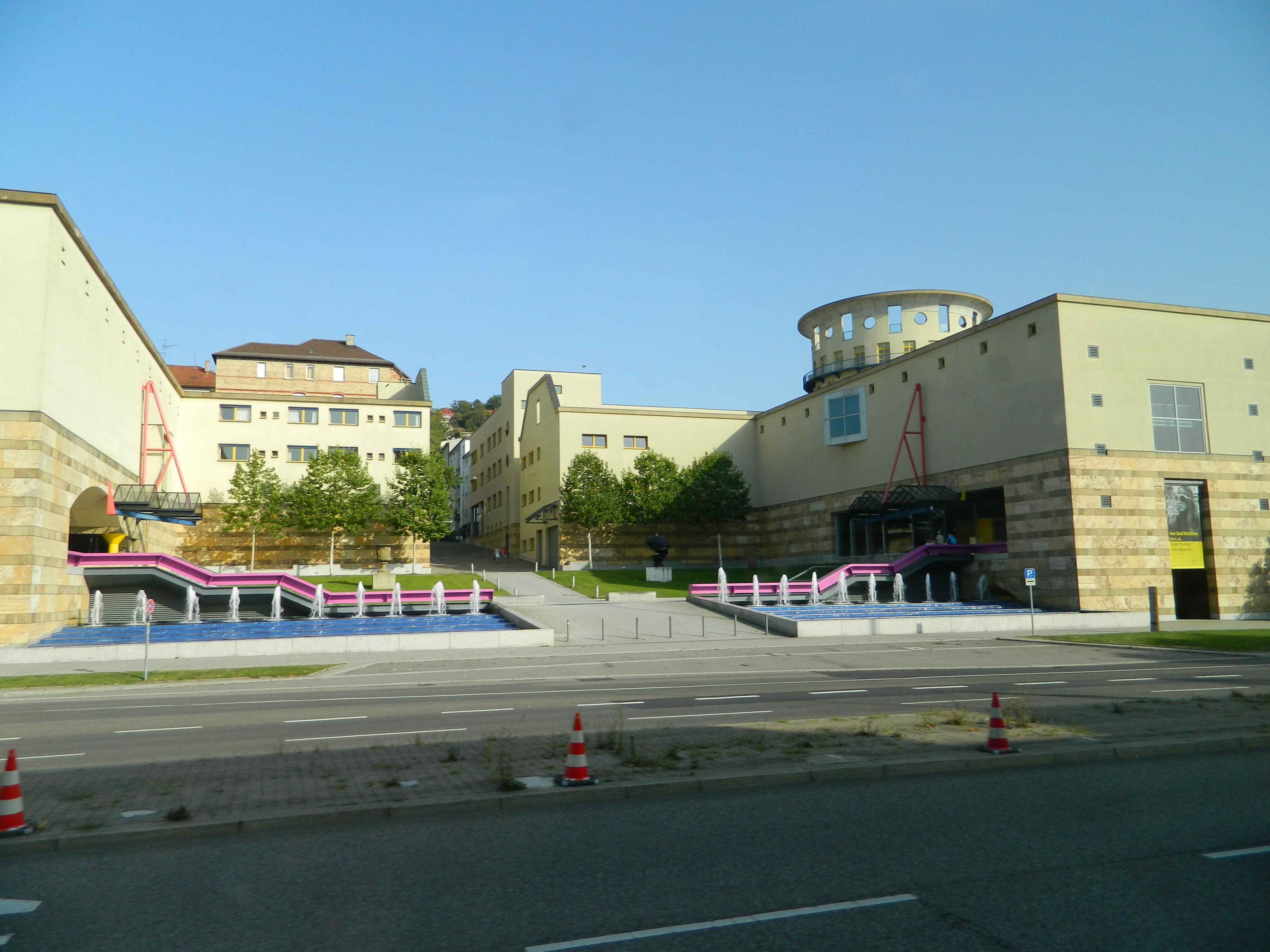 Stuttgart